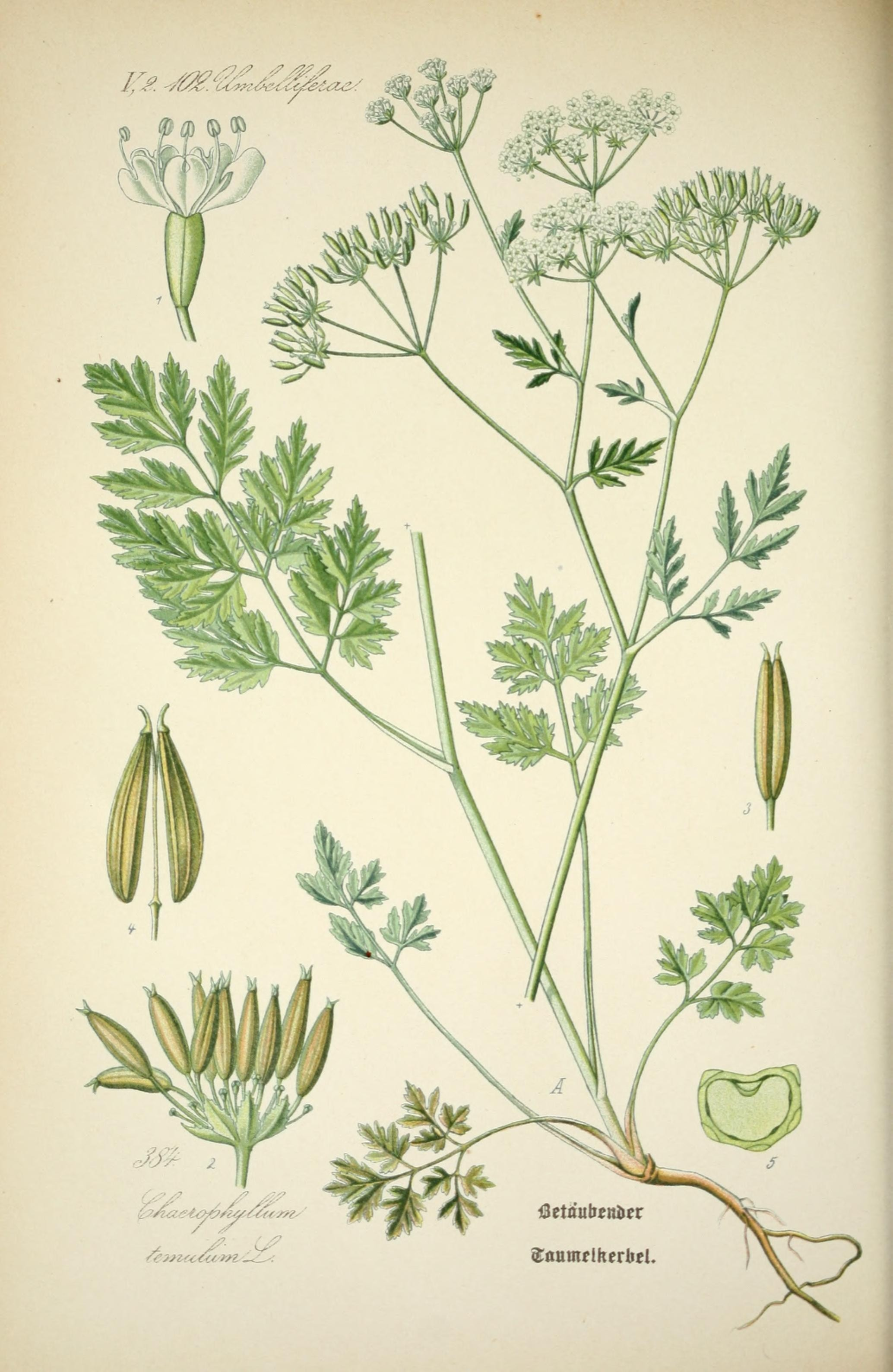 r y. -v^/u'^^-t .£&!.■